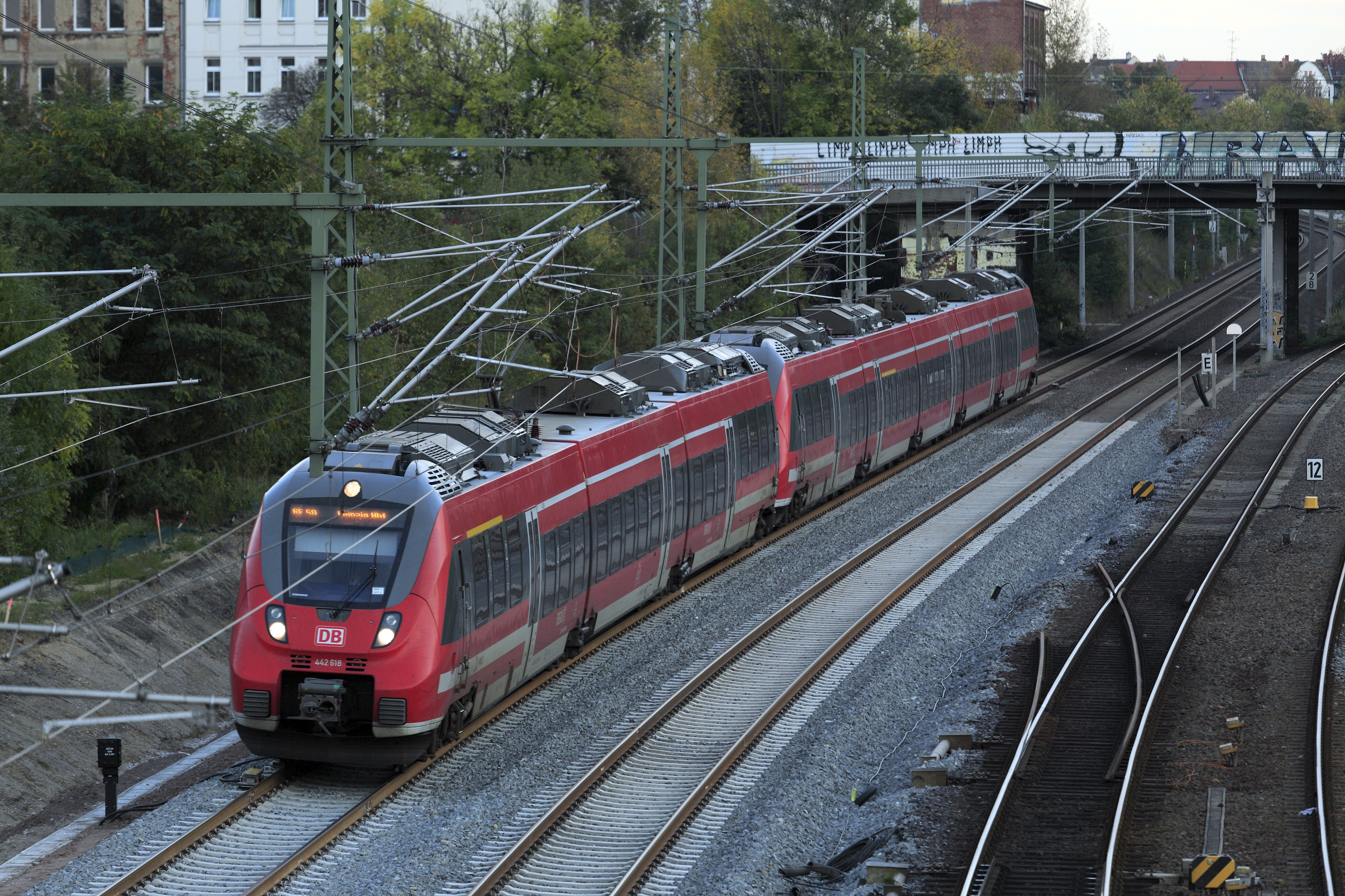 RE Dresden–Leipzig zwischen Torgauer und Benningsenstraße, zwei Einheiten der BR 442. Der helle Schotter kennzeichnet das Bauende der Einbindungsarbeiten der Schnellfahrstrecke Eltersdorf–Leipzig auf der Seite Richtung Dresden. Die Weichenverbindung zwischen den Strecken LG und LD ist ausgebaut, die Bahnhofsgrenze wurde für die Strecke Leipzig–Dresden bis kurz vor die Hermann-Liebmann-Brücke zurückverlegt.